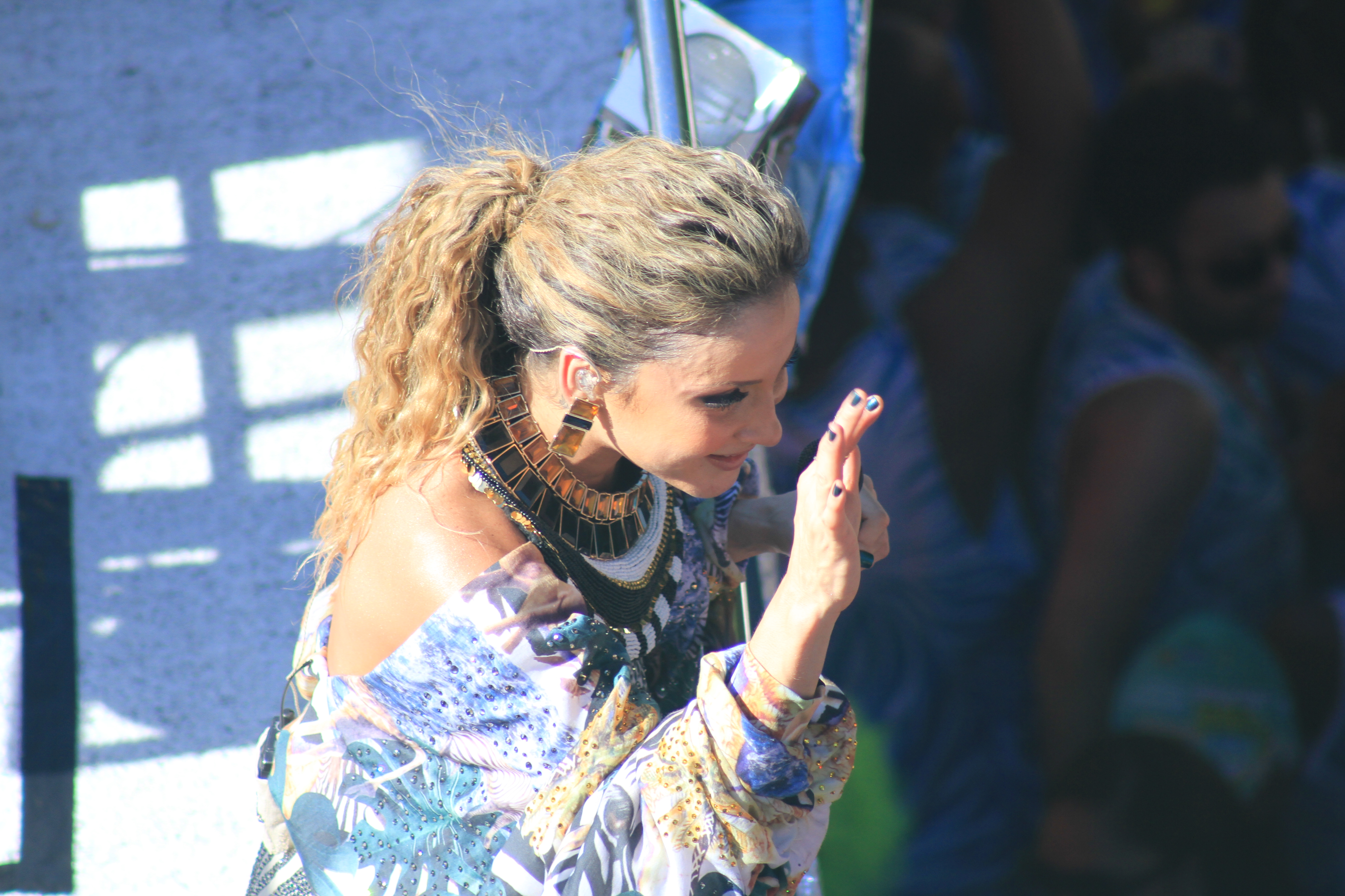 Bloco O Papa com Cláudia Leitte no Circuito Osmar em (21.02). Foto: Tatiana Azeviche - Setur